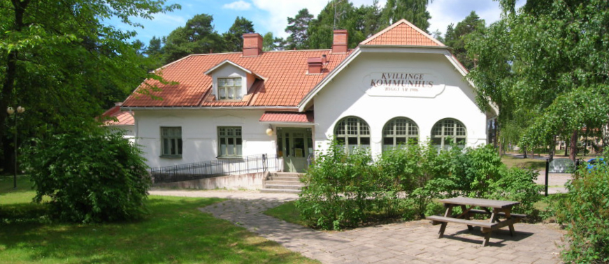 Kvillinge f.d kommunhus, byggt 1906, Åby, Norrköpings kommun, Sweden.